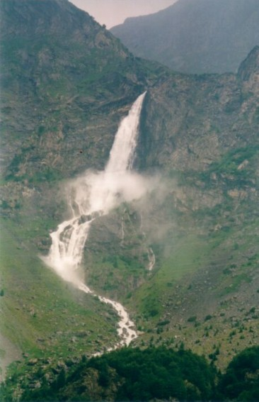 Cascate del Serio a Valbondione (Bergamo - Italia)